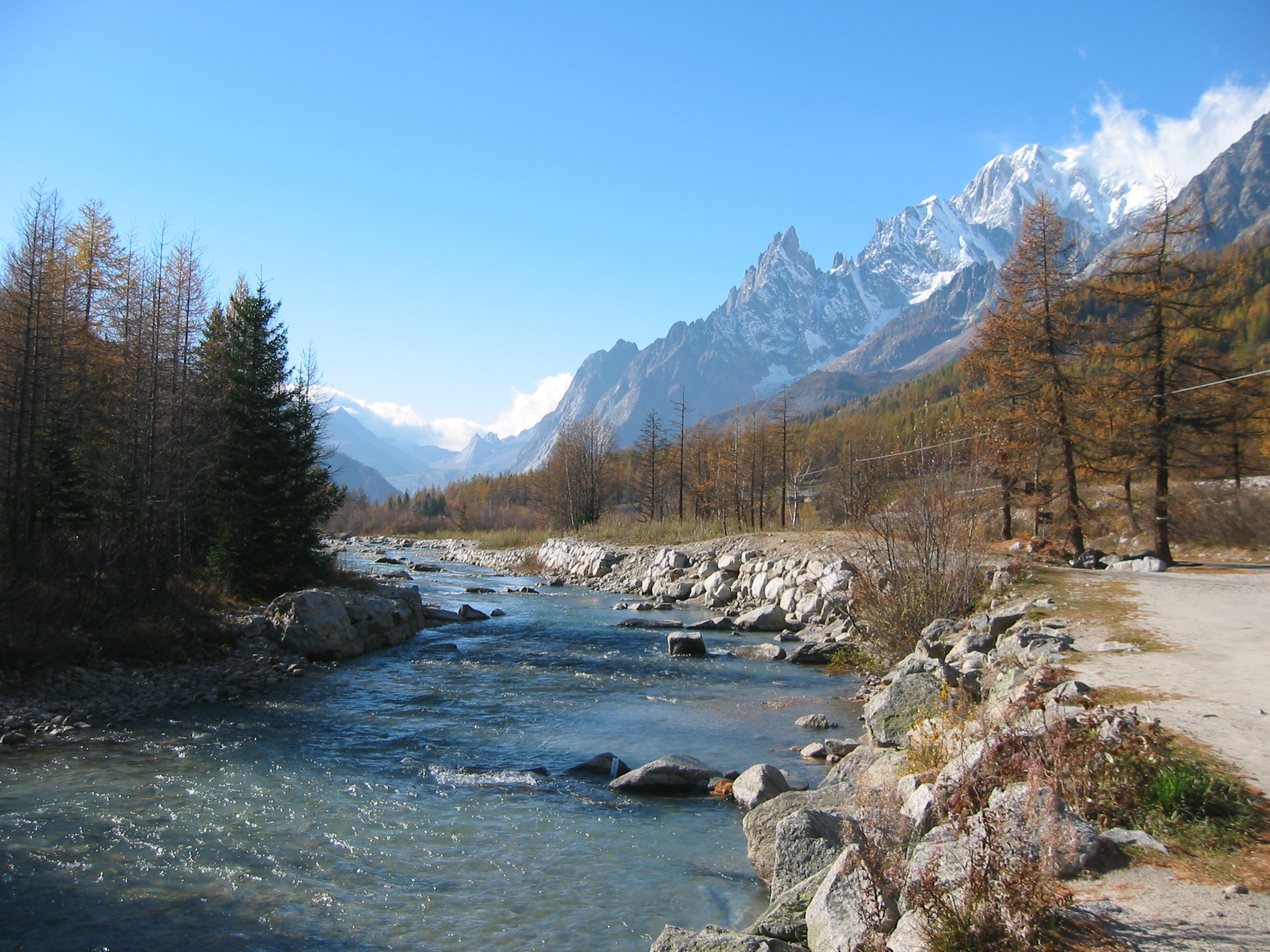 Paesaggio della Val Ferret (Courmayeur), Dora di Ferret